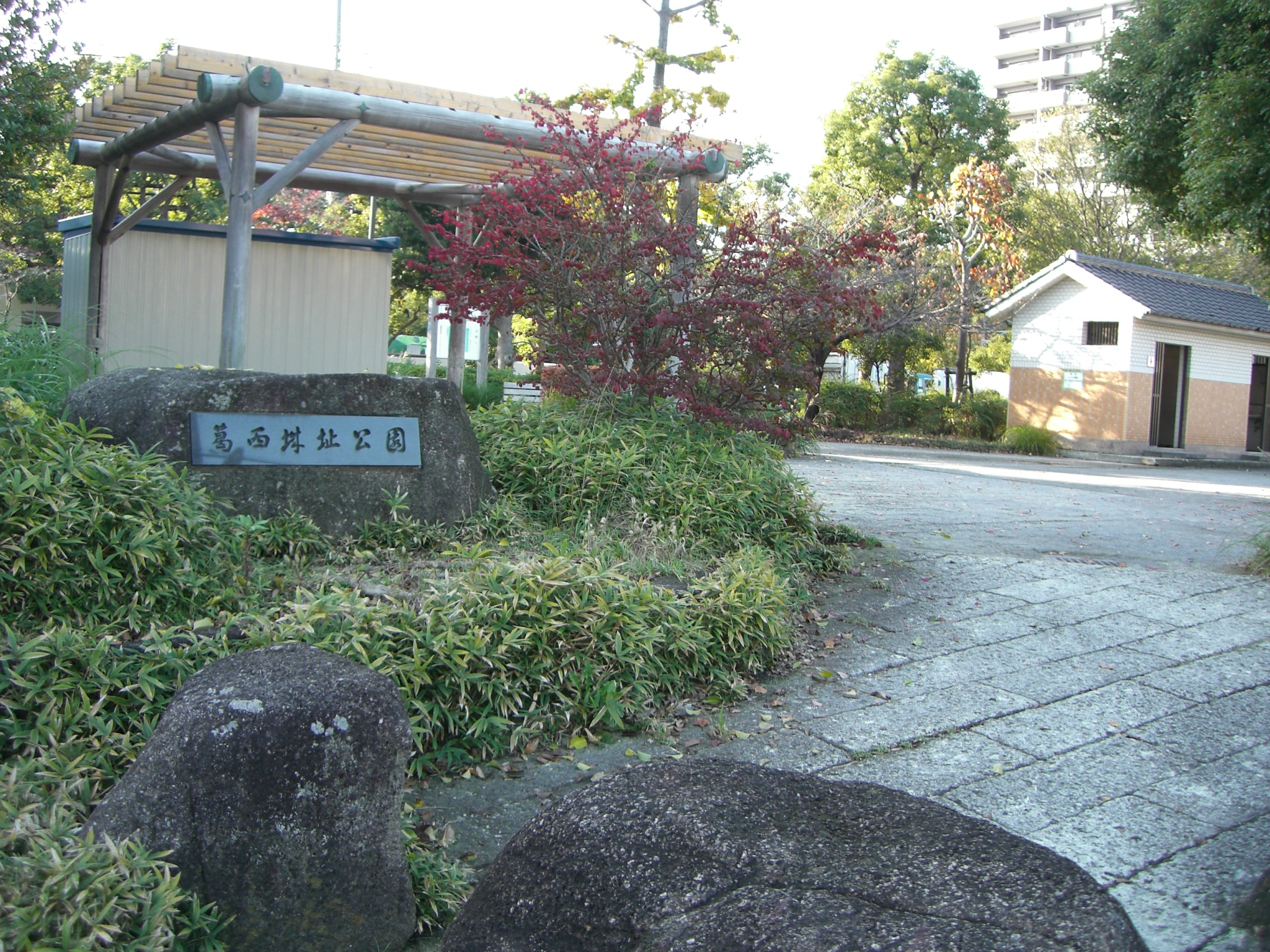 葛西城跡公園